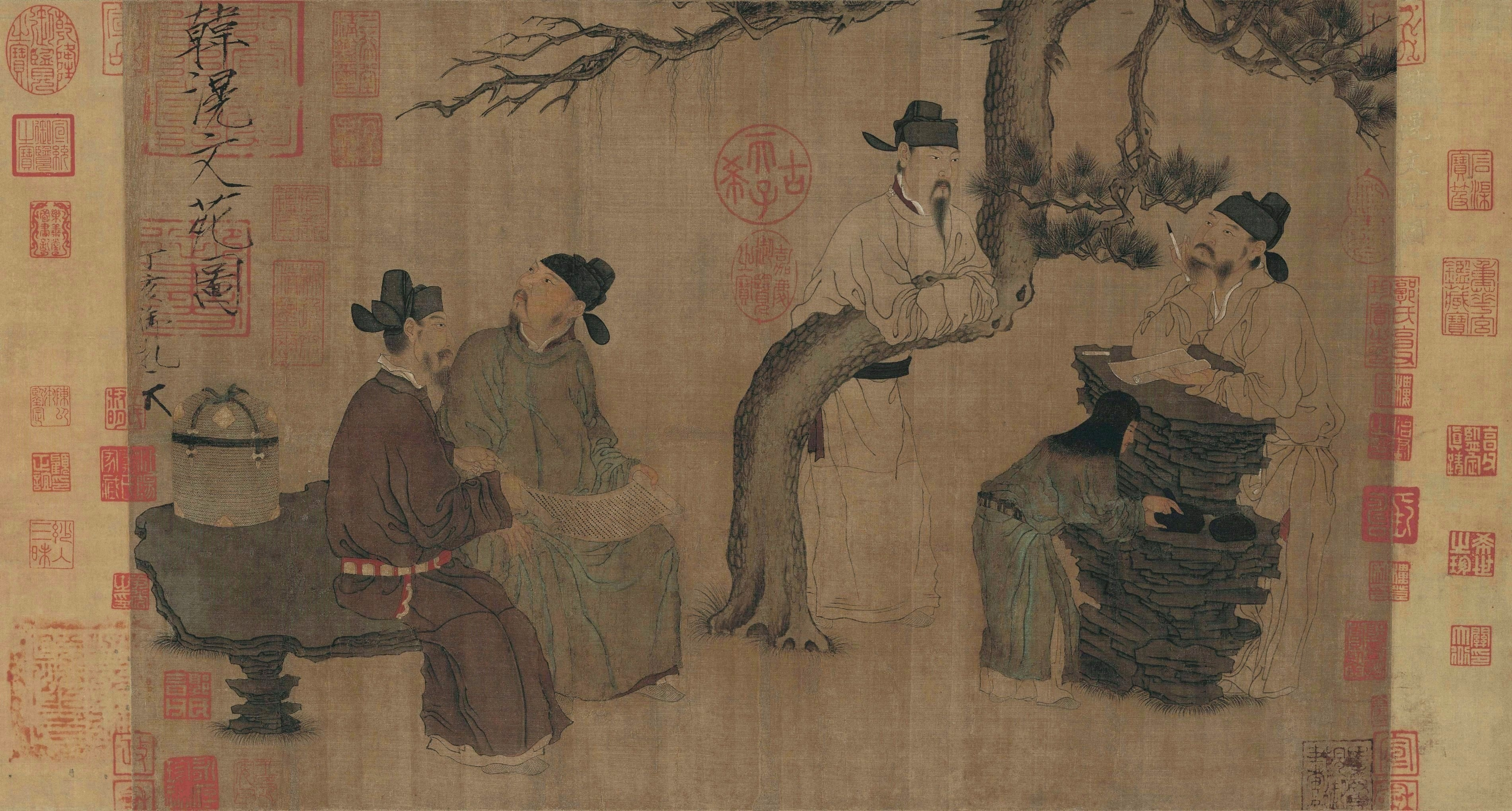 Люди в саду литературы